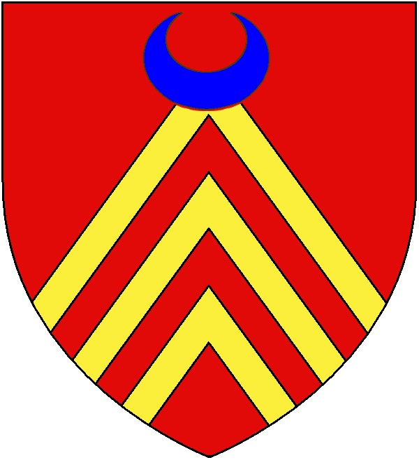 Armes brisées de Philippe de Crèvecoeur, maréchal d'Esquerdes